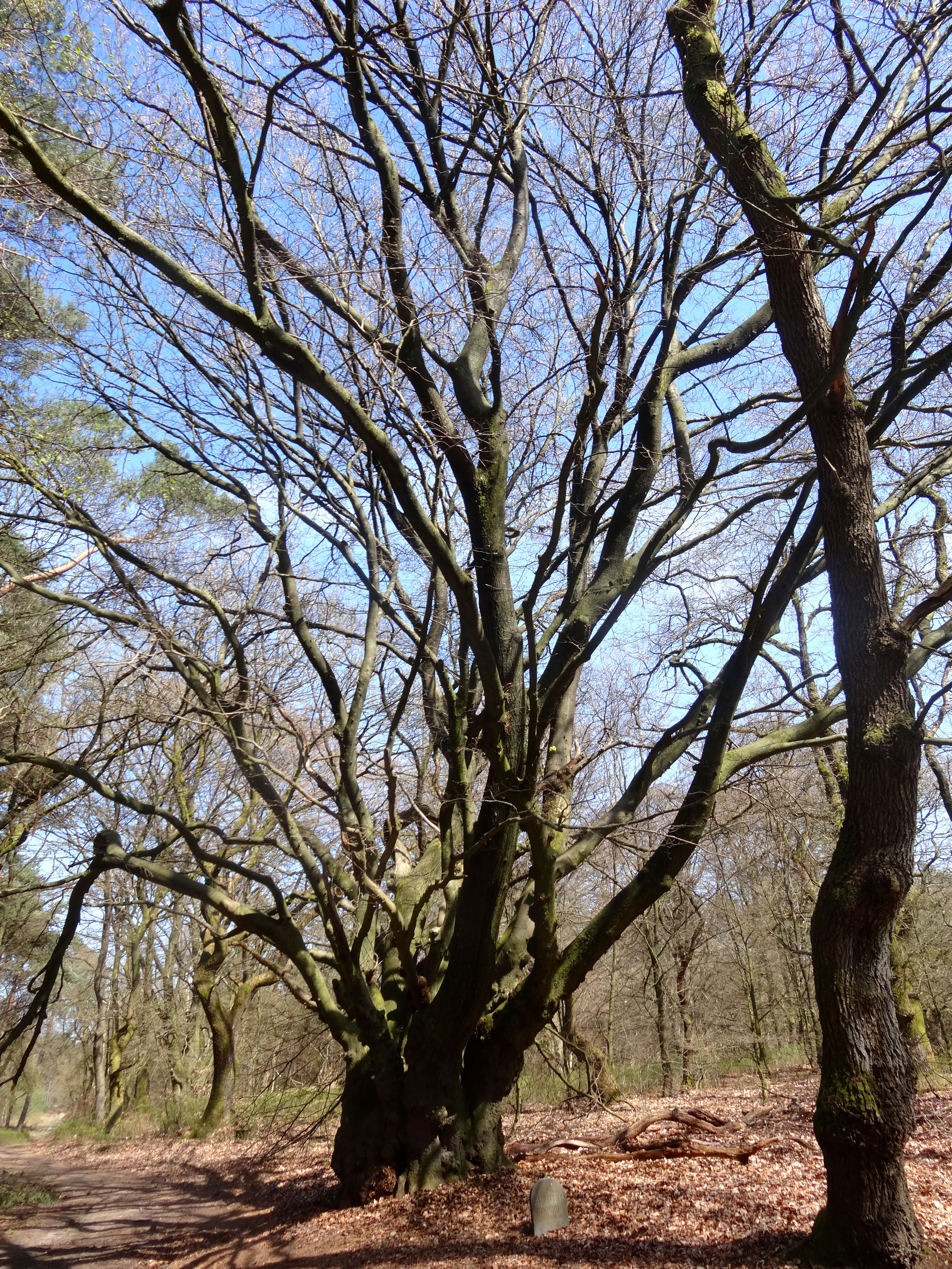 Peter Gerritsboompje in het Wieselsche bos - Kroondomein - Koninklijke houtvesterij